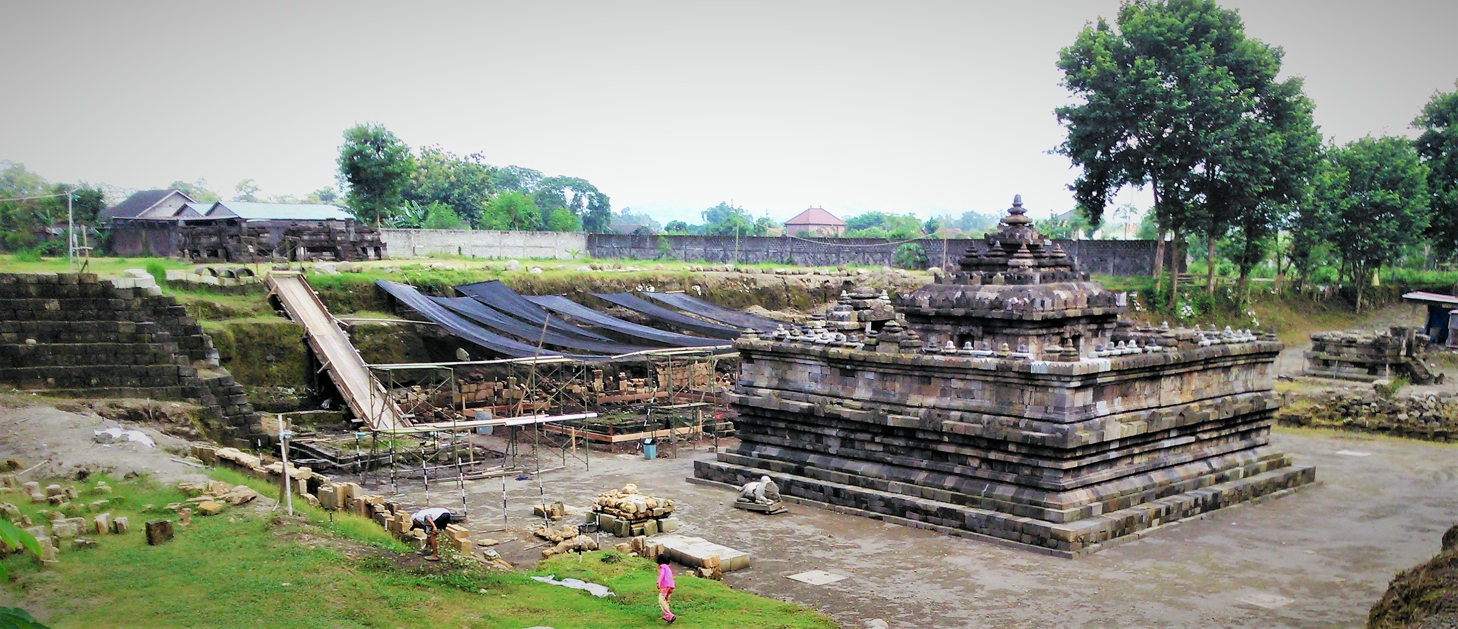 Panorama diambil dari sudut barat laut. Candi dalam tahap restorasi. Paling kanan tampak bentuk perkiraan salah satu candi perwara. Dua susunan perwara lainnya diletakkan di atas (sisi kiri atas). Dinding pembatas ada di sisi paling kiri gambar.